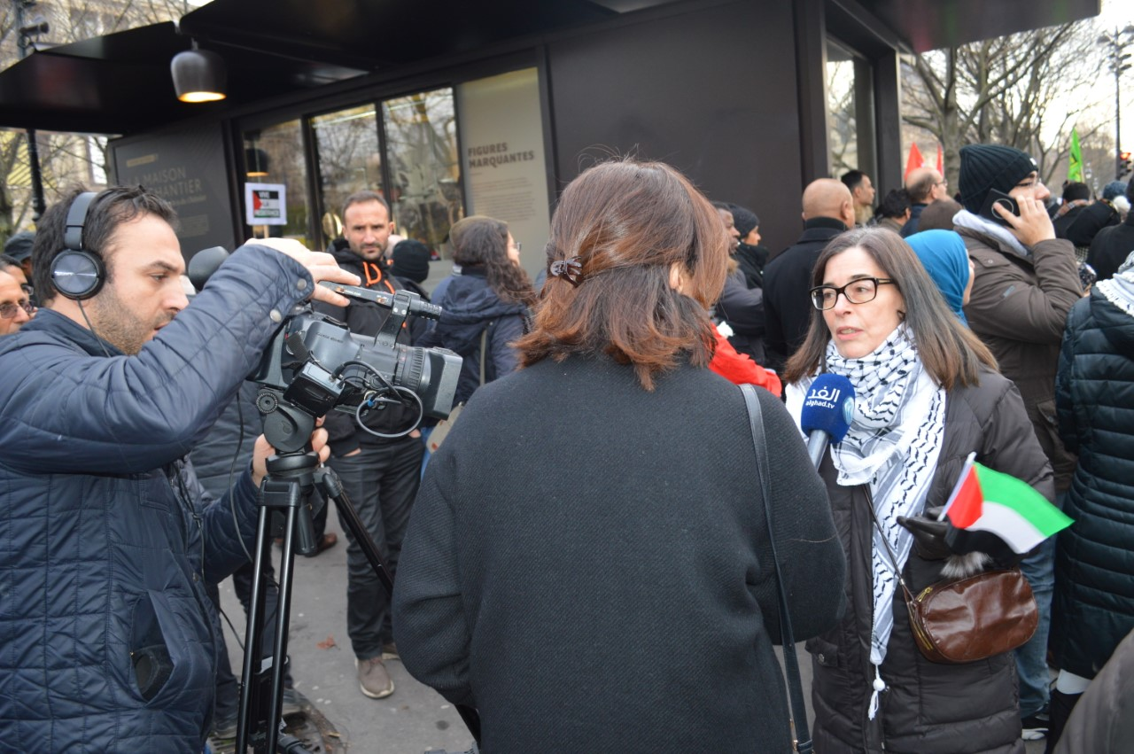 Alghad TV reporter from Paris in 2017.